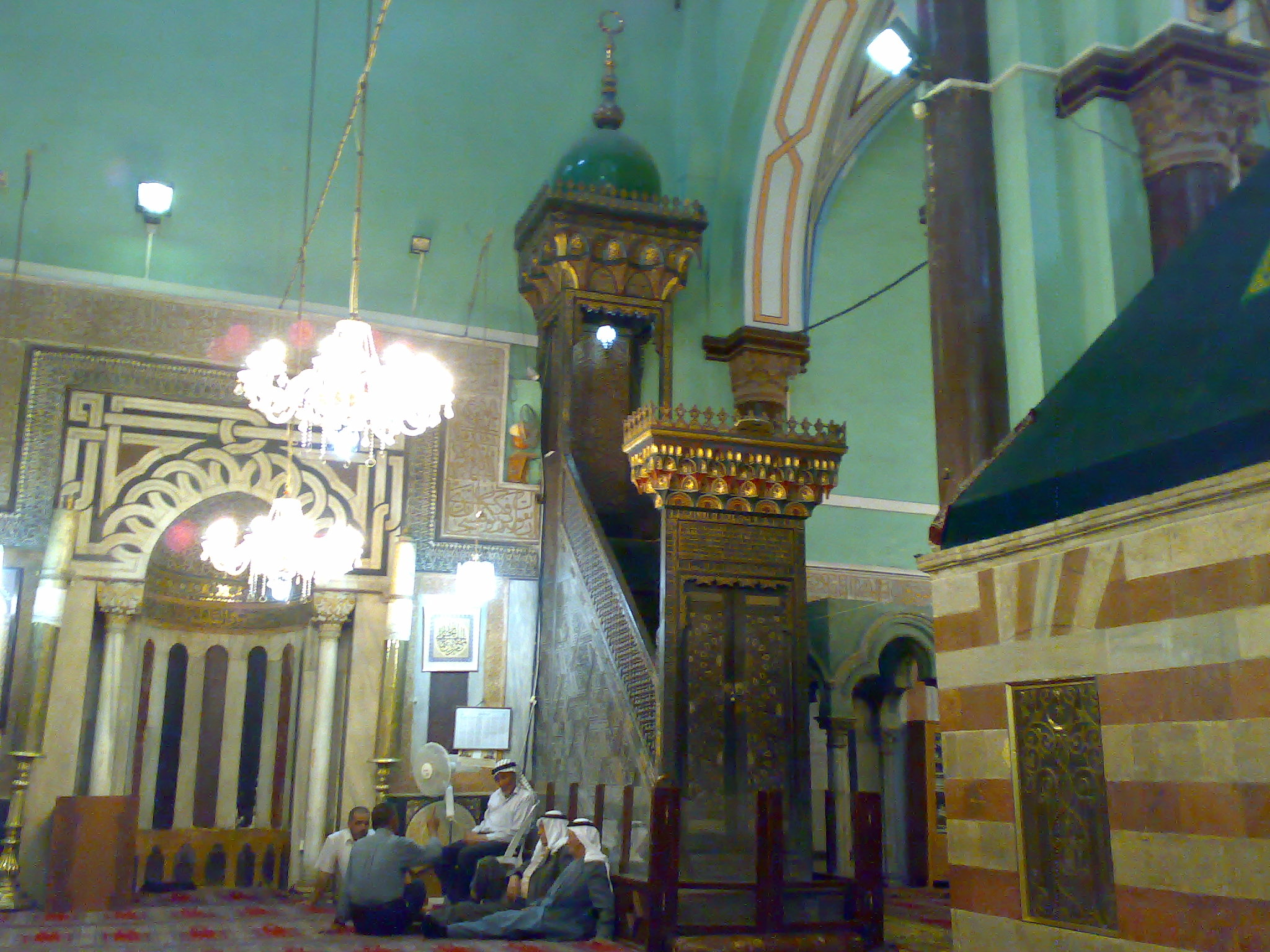 Saladin Minbar in Al-Haram Al-Ibrahimi